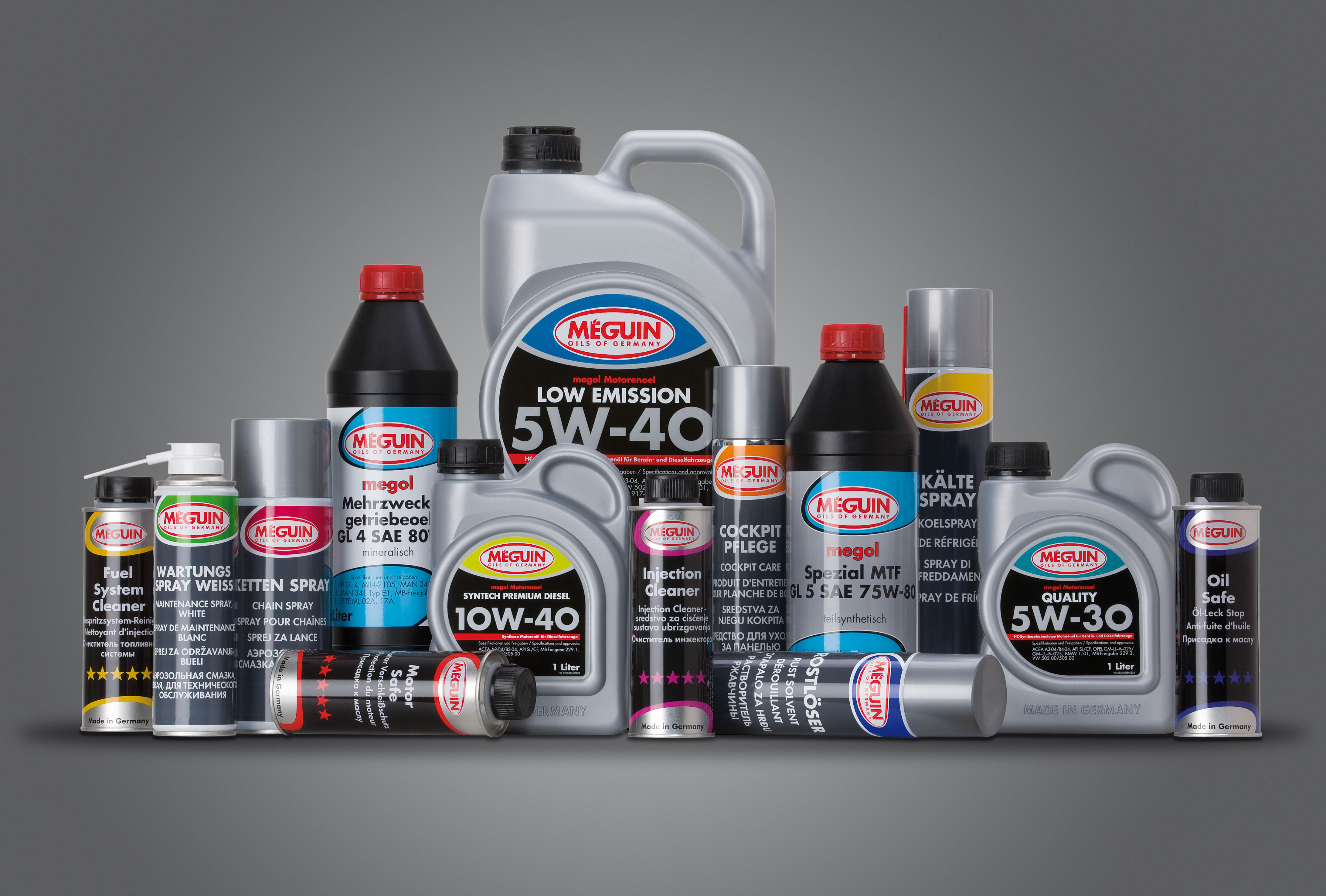 Produktsortiment Méguin